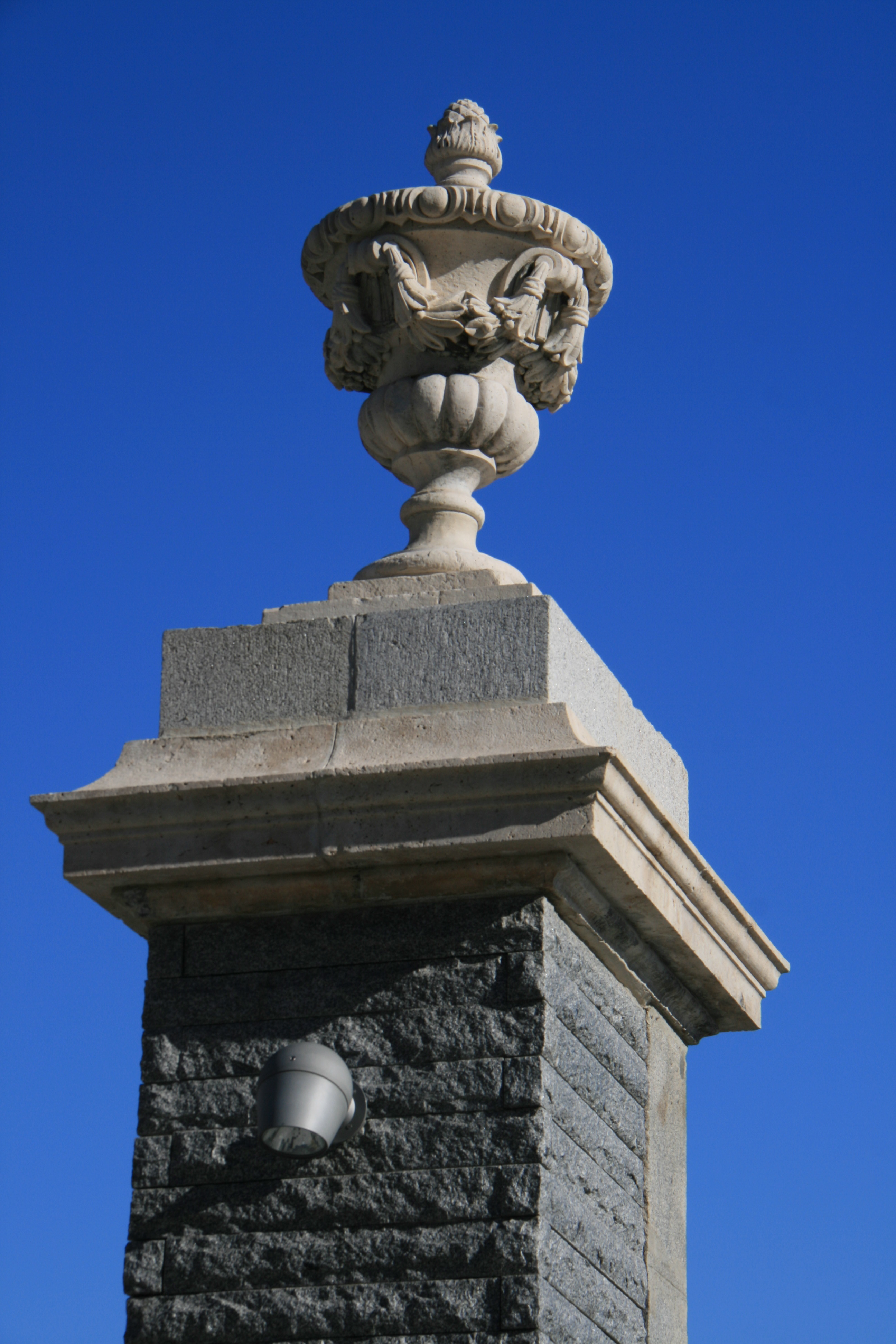 Detalle ornamental de la Puerta del Río - Madrid